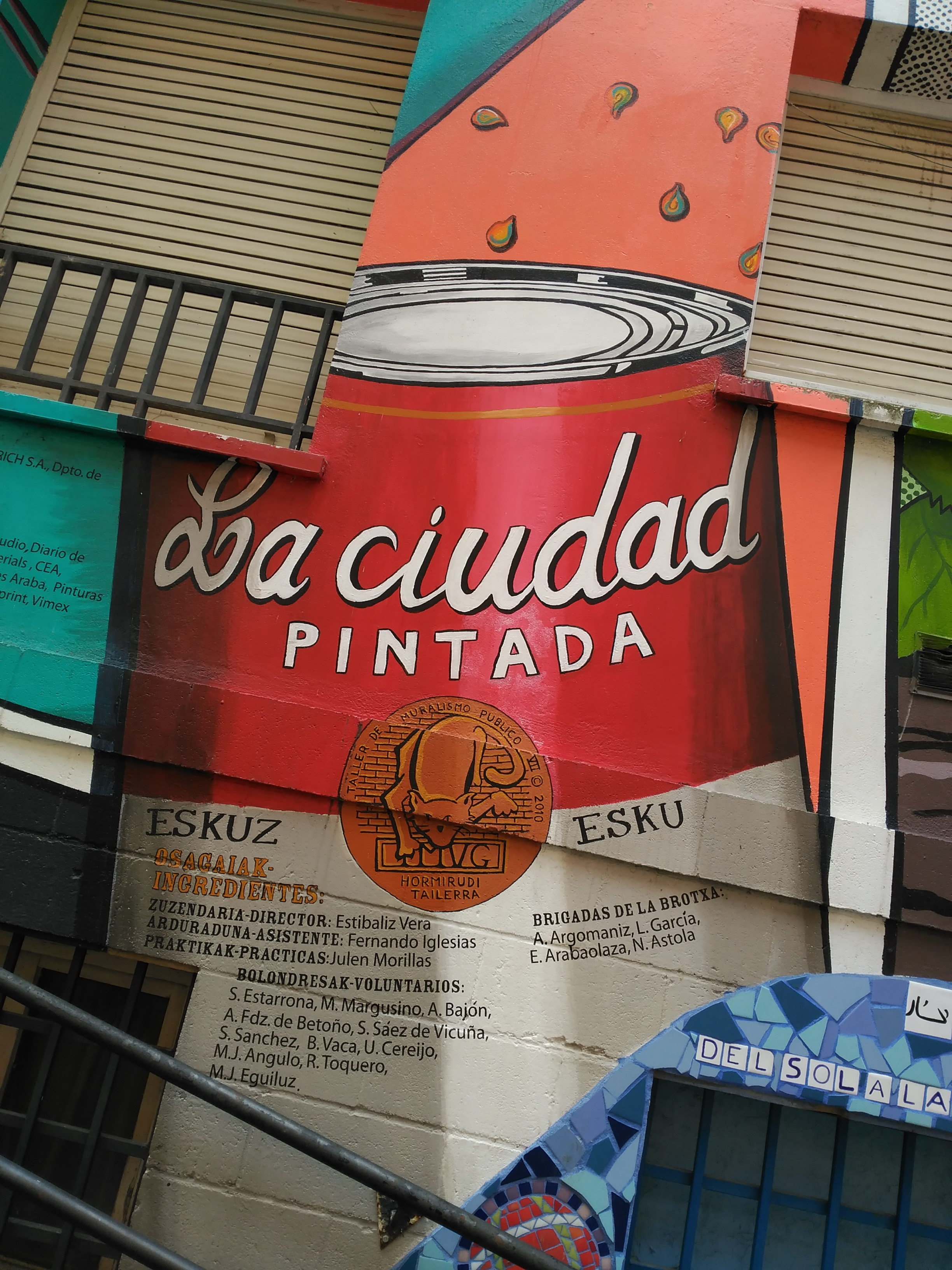 Detalle del mural Eskuz Esku